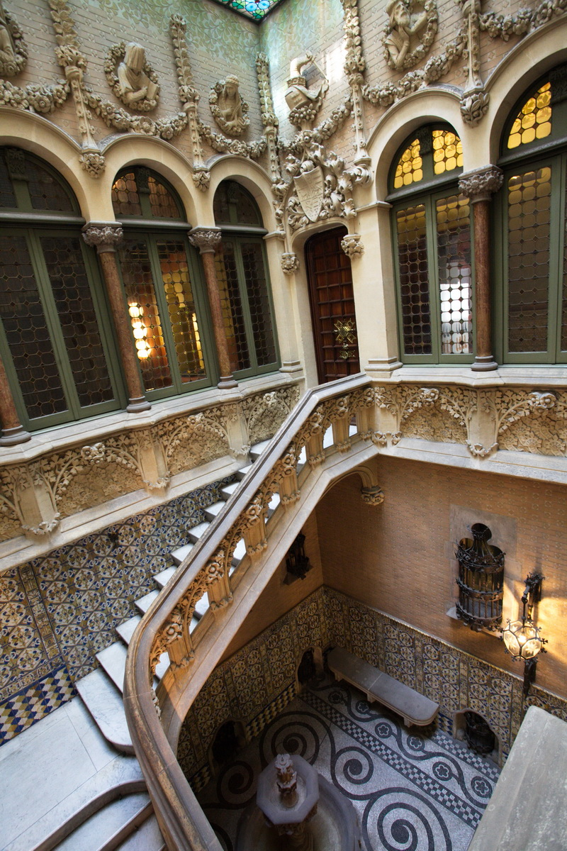 Palau del Baró de Quadras (Barcelona)